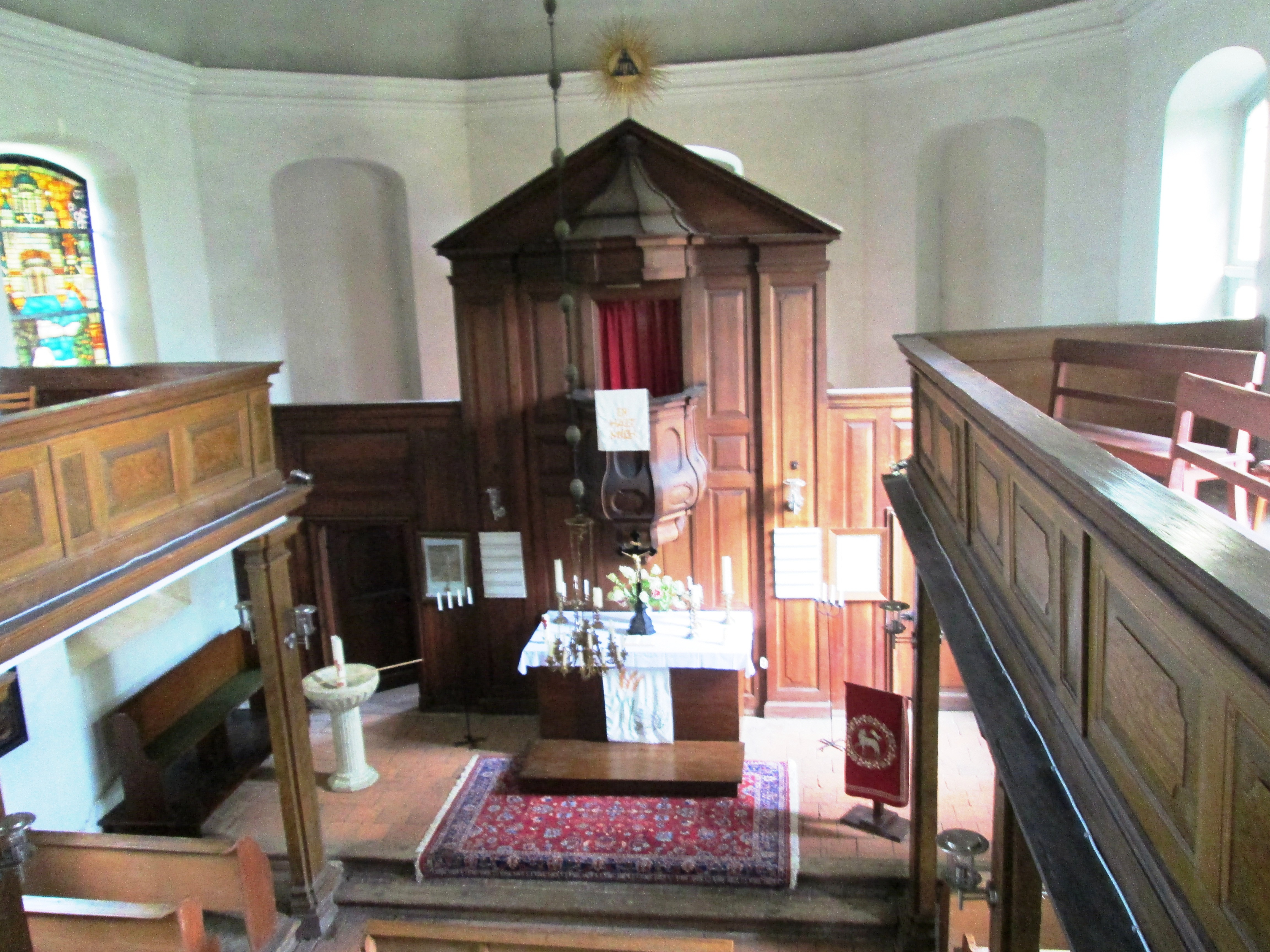 Dorfkirche Päwesin, Inneres